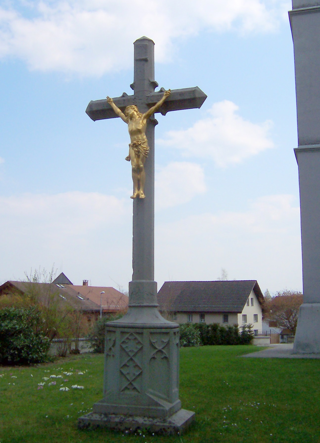 Pfarrkirche St.Nikolaus in Auw, Kanton Aargau, Schweiz. Kruzifix vor der Kirche.